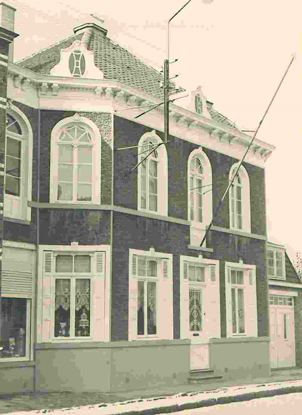 voorgevel huize Anna Mahieu